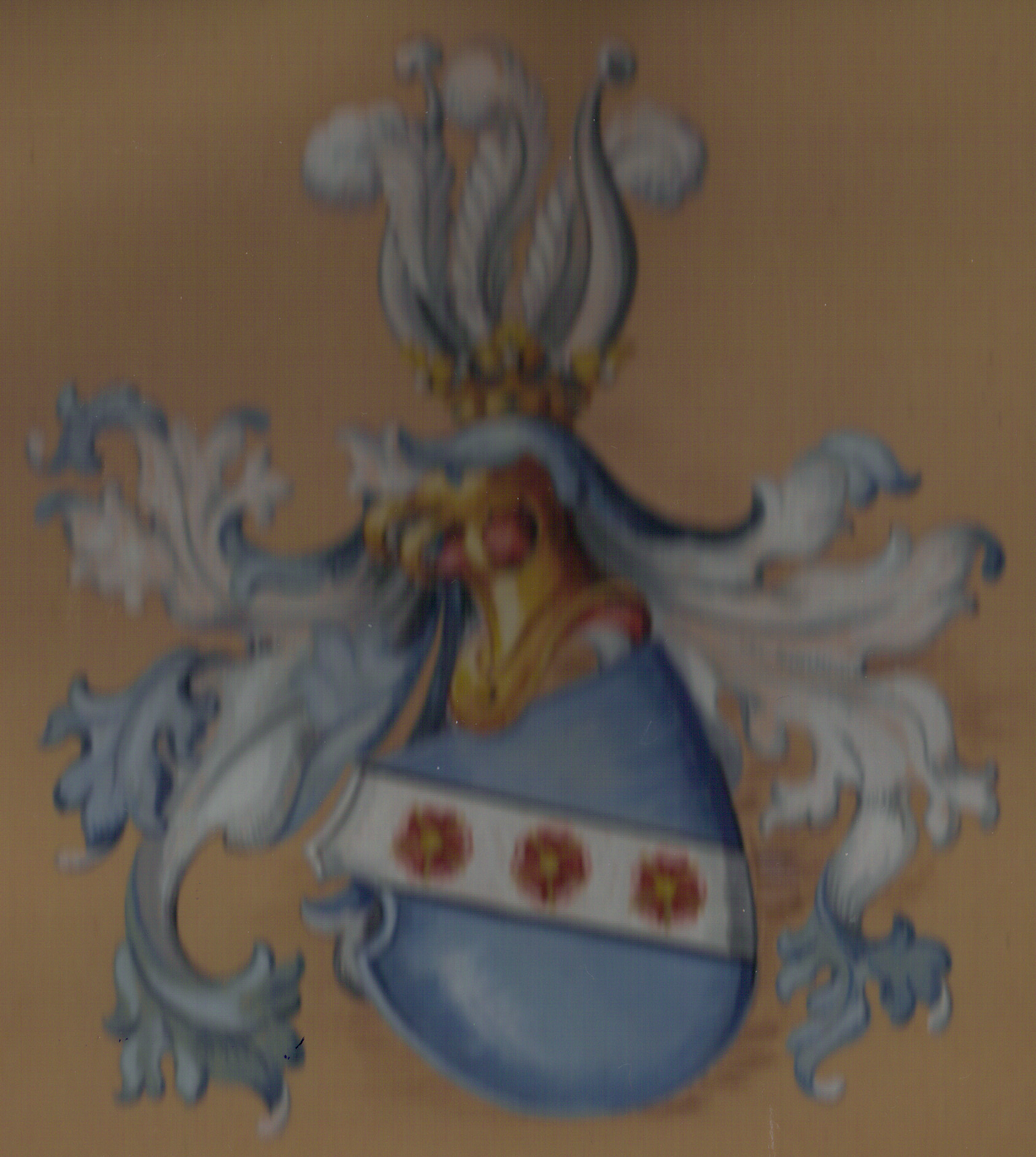 Wappen der Familie von Dossow